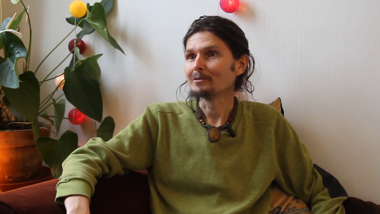 Interview de Thierry Casasnovas pour Le Chou Brave en 2013